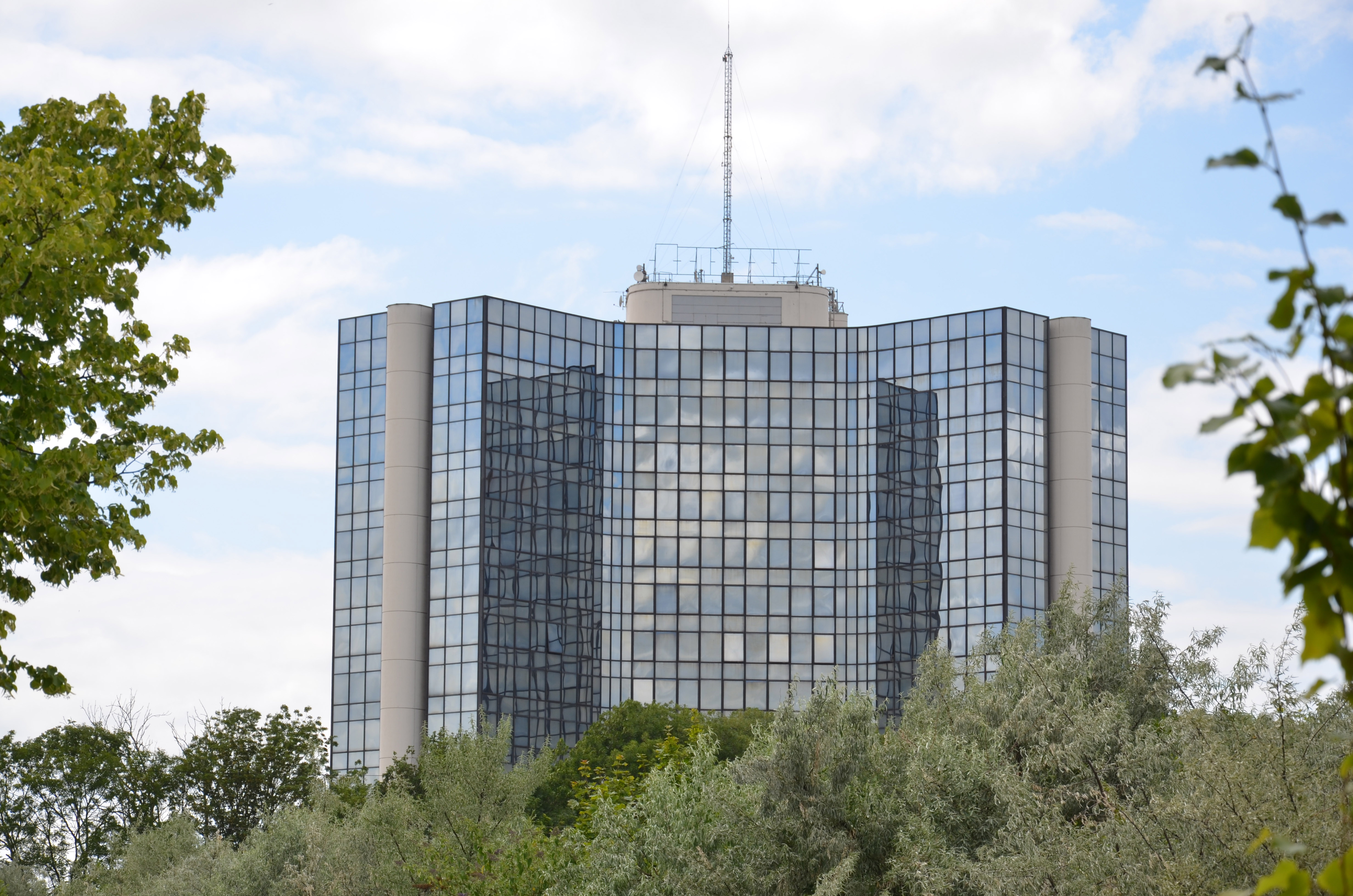 Tour Mercure, dans la zone de l'Union, à Roubaix, photographiée à partir de la berge du Canal de Roubaix, juin 2011